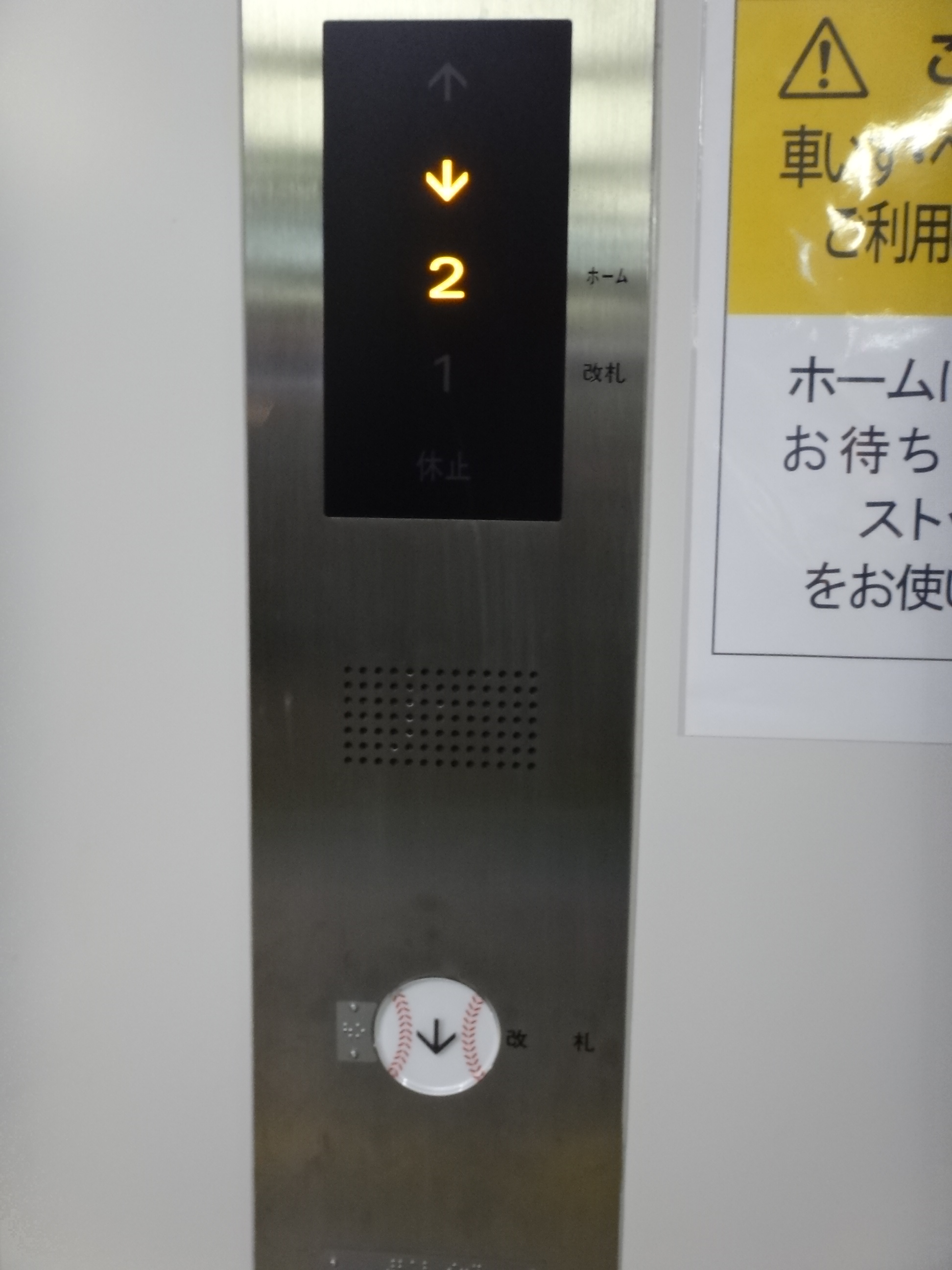 阪神甲子園駅に設置されたエレベーターのかご呼び出しボタン（ホームに設置しているもの）